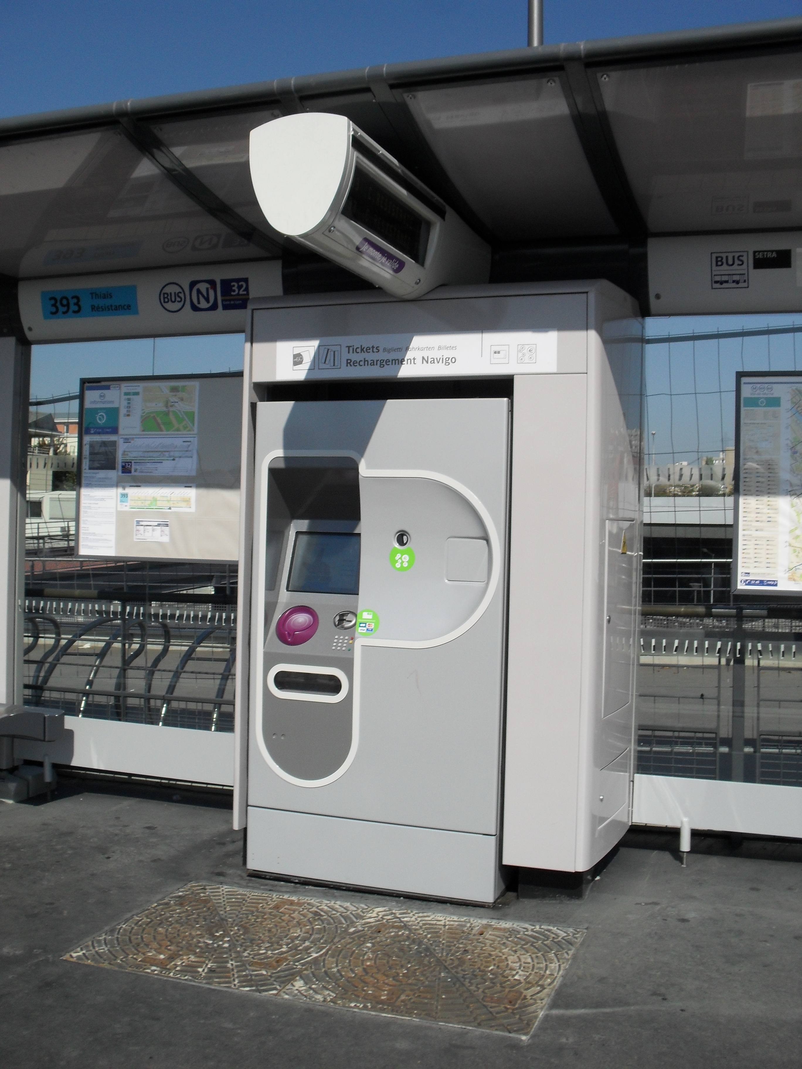 Mobilier Station TCSP 393 : Pointe du Lac